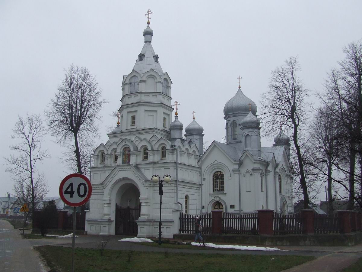 Cerkiew pw. Świętych Apostołów Piotra i Pawła w Wasilkowie